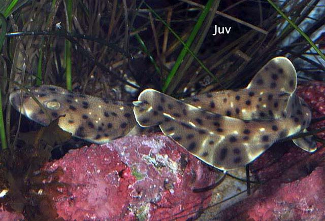 Cephaloscyllium ventriosum (Cabrillo Aquarium)